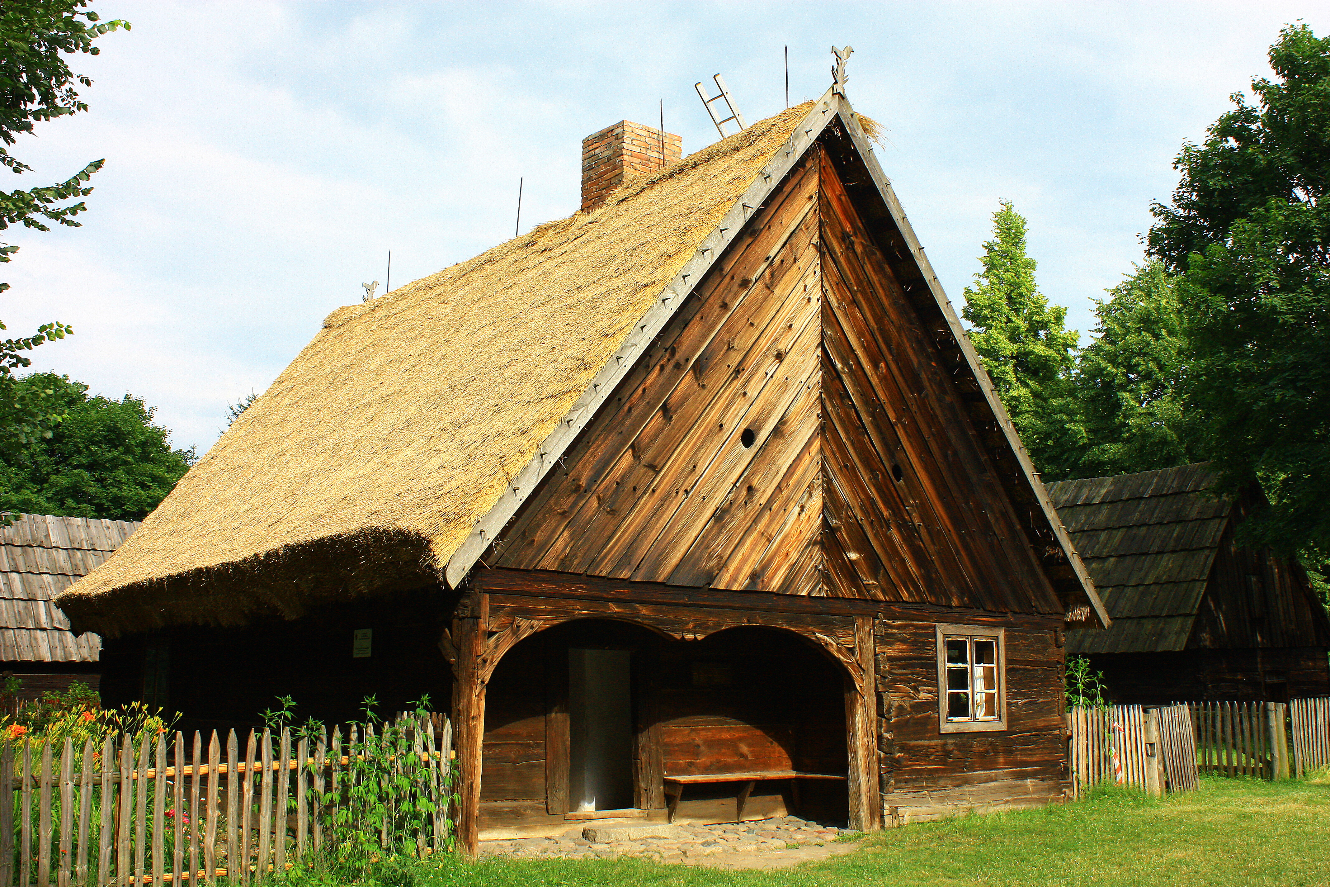 Toruń - Park Etnograficzny - Zagroda z Borów Tucholskich - chałupa ze stajnią z Suchej, 1. poł XIX w.